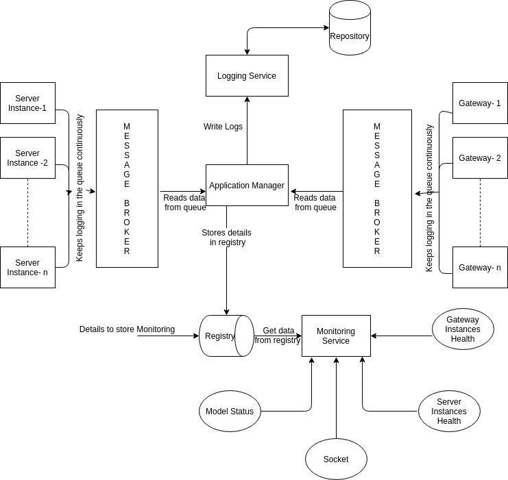 मॉनिटरिंग सर्विस